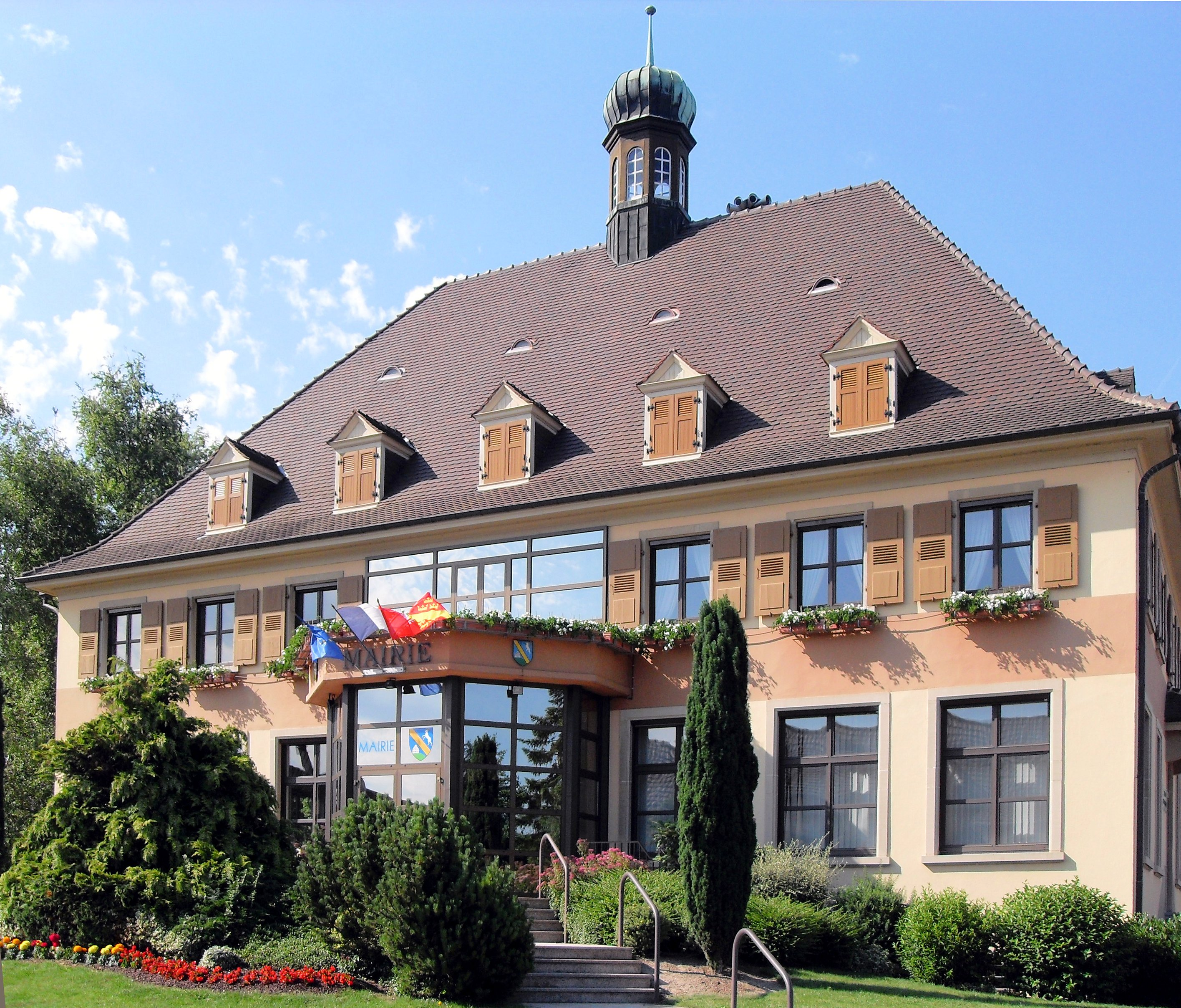 La mairie d'Obenheim